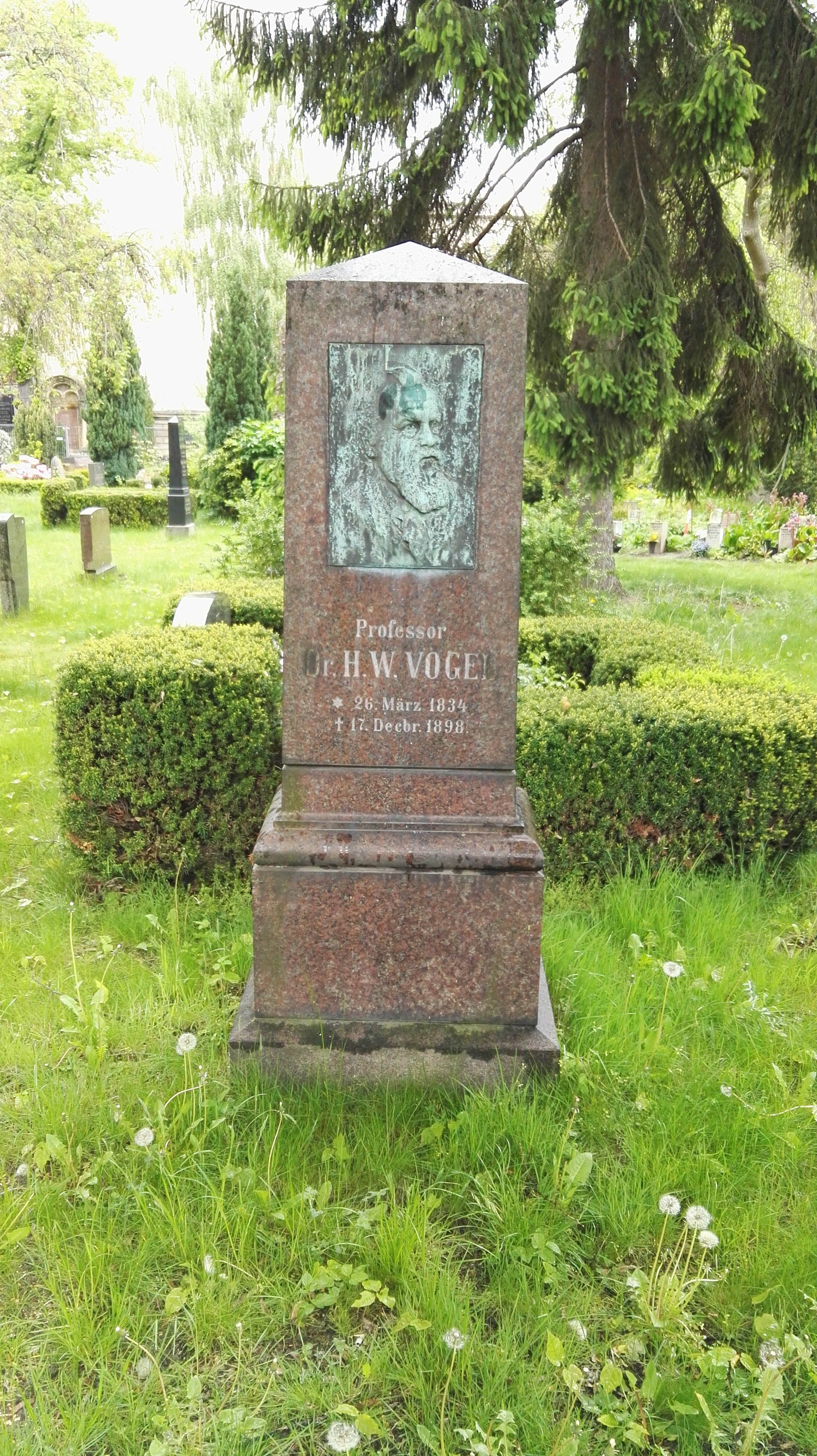 Grabstein von Hermann Wilhelm Vogel auf dem Alter Friedhof der Zwölf-Apostel-Gemeinde in Berlin-Schönberg